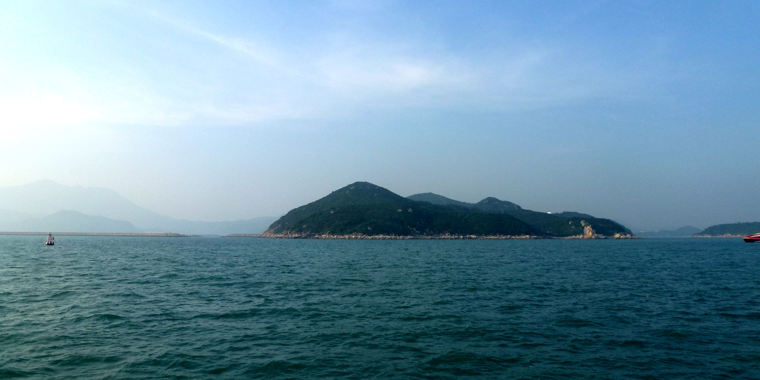 Hei Ling Chau Island on Cheung Chau Ferry Hong Kong